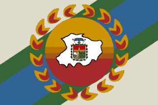 Bandera del municipio Torres, estado Lara, Venezuela